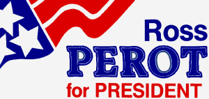 Logo for Ross Perot presidential campaign